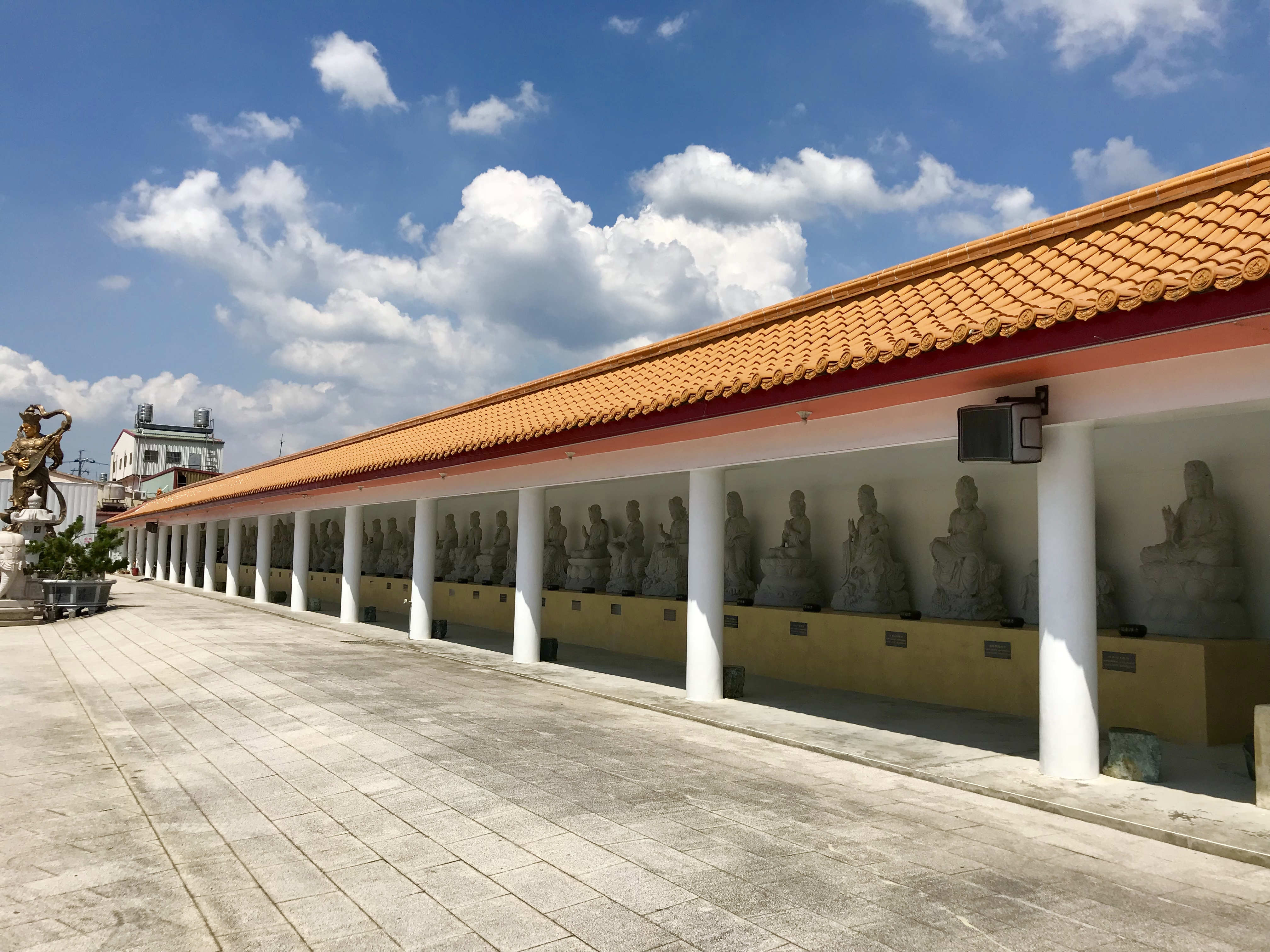 中文（台灣）: 潮音禪寺文化長廊